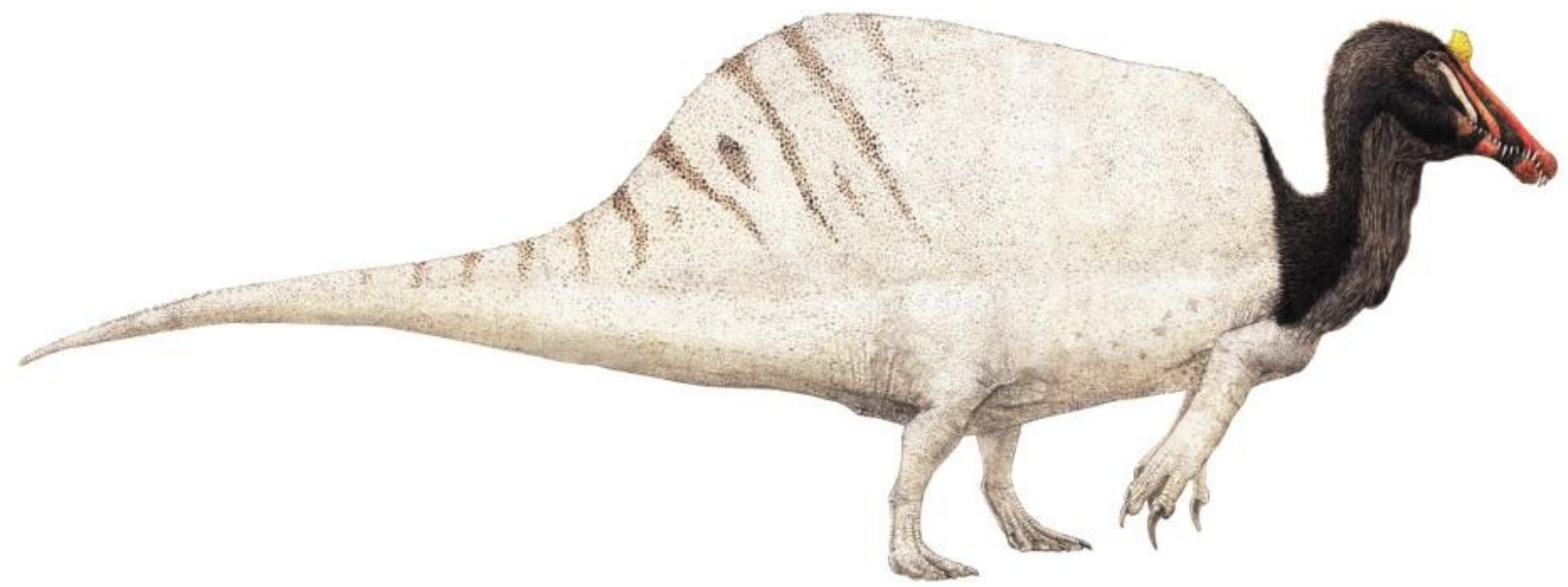 Spinosaurus aegyptiacus reconstruction